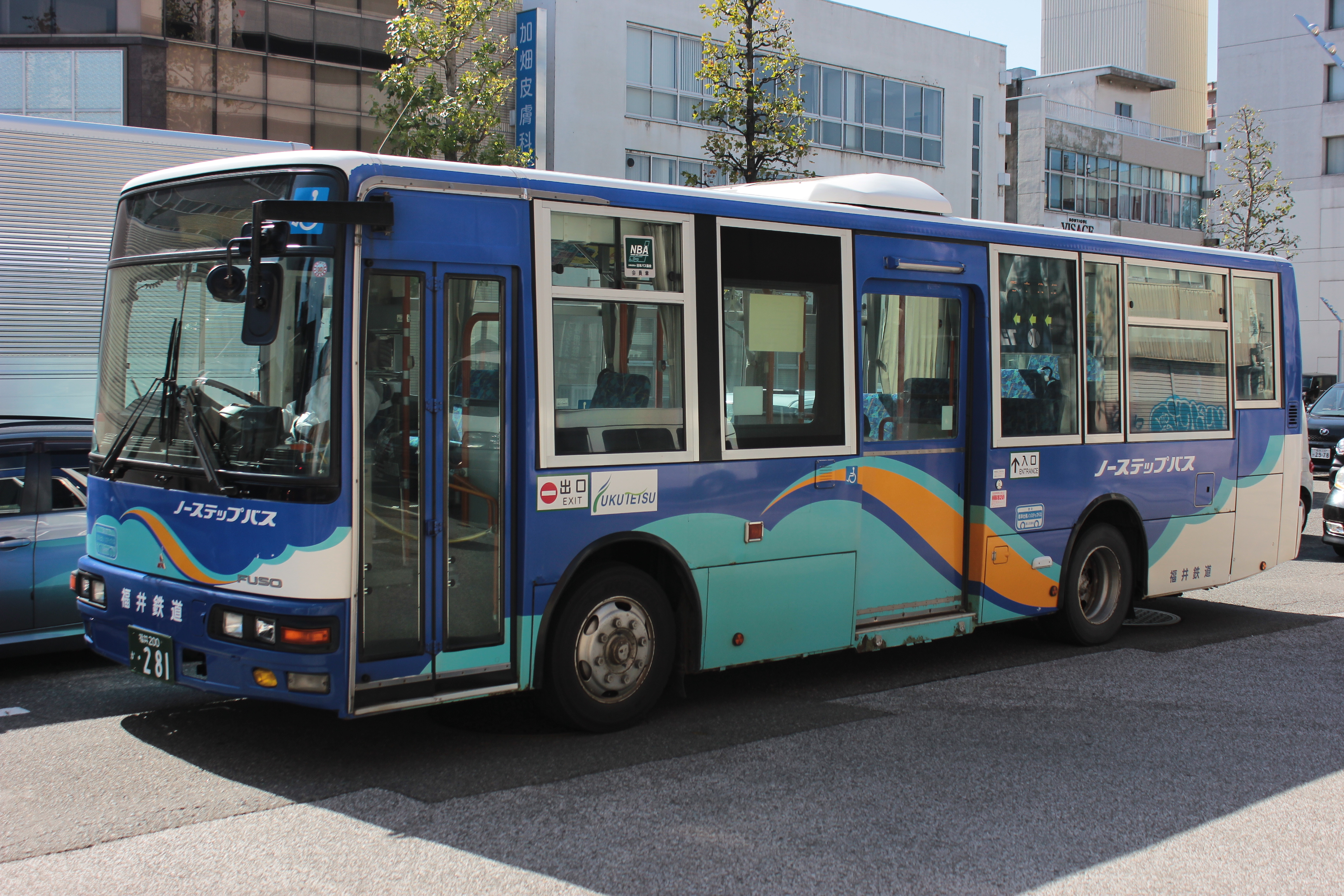 福井鉄道の路線バス。福井市内にて。 Canon EOS Kiss X5